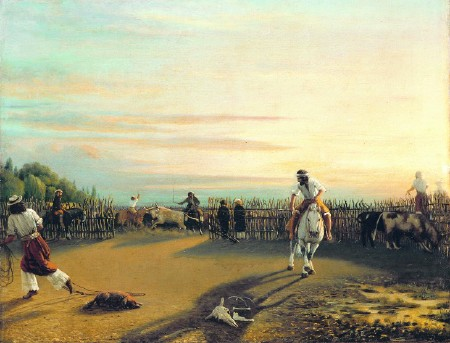 Aaprtando en el corral.